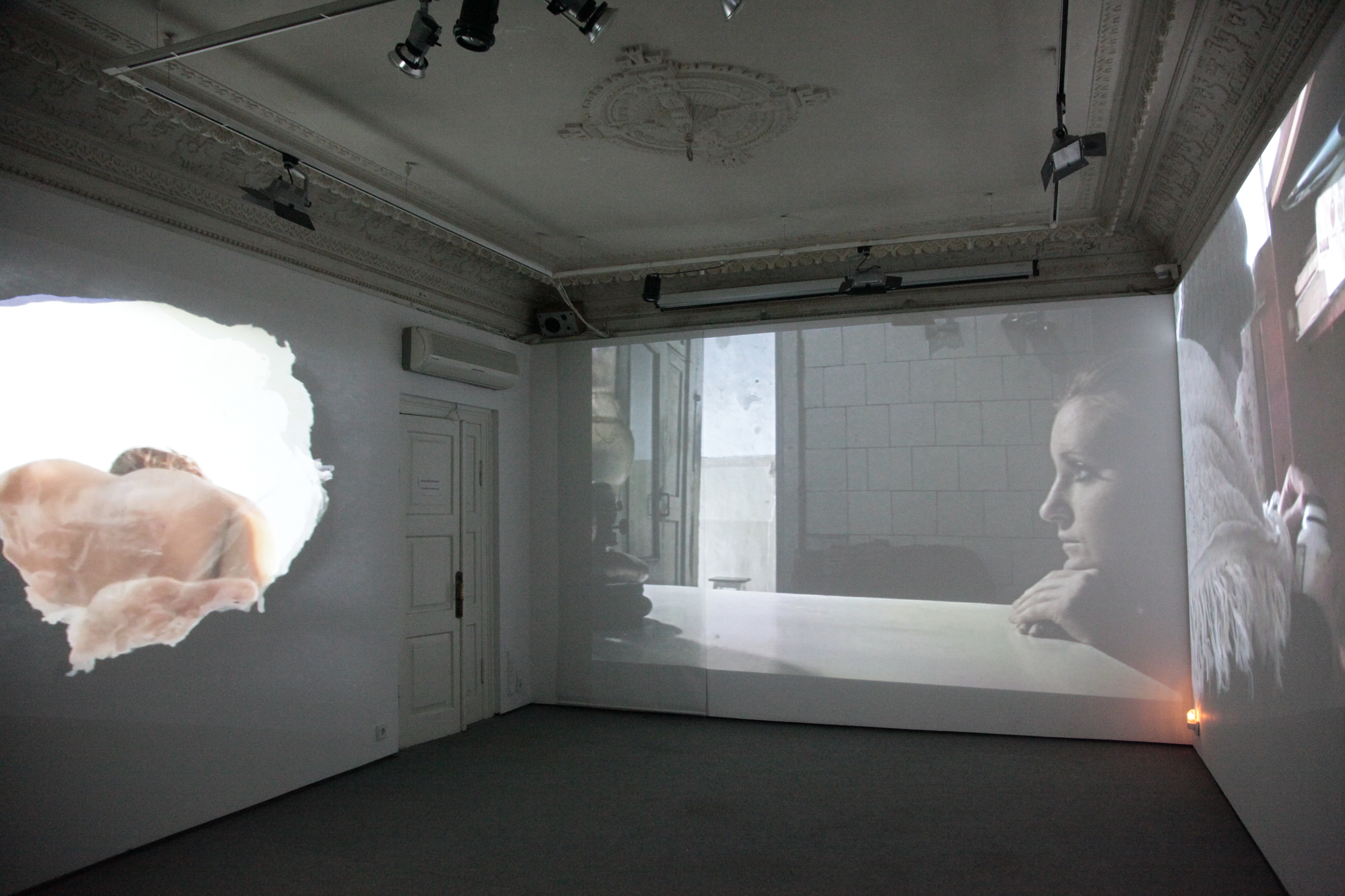 Тотем "Зупинка в русі / Stop in motion", 2011